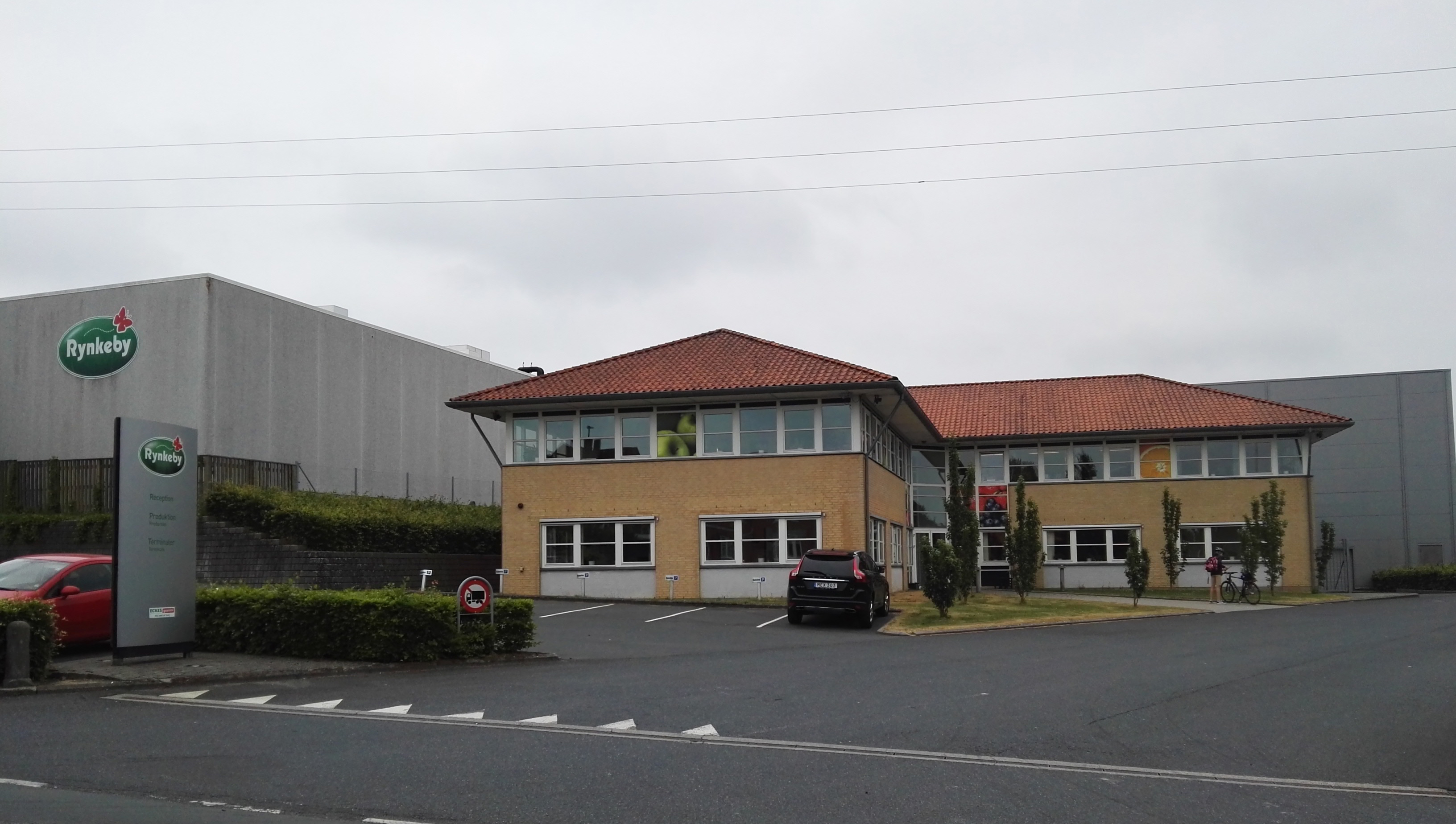 Rynkeby Foods i Ringe